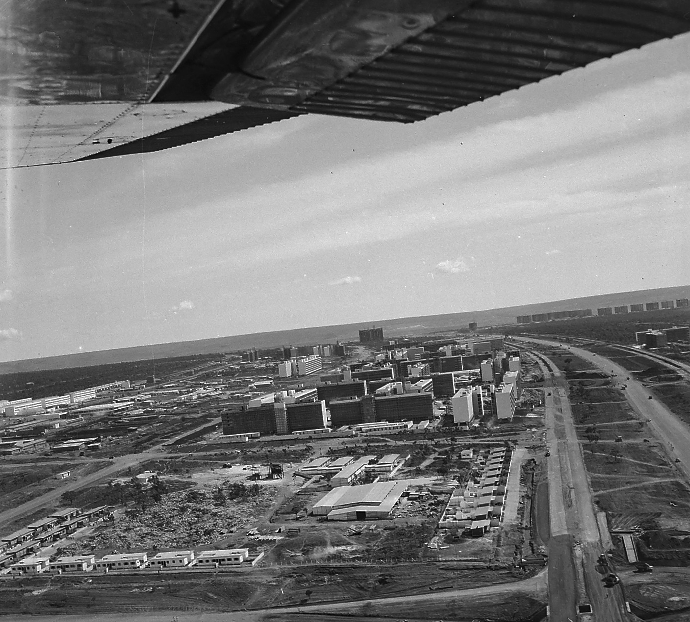 Imagem do Fundo Agência Nacional, do Arquivo Nacional